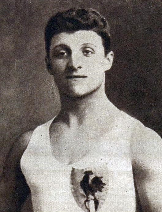 Alfred Krauss en 1928.